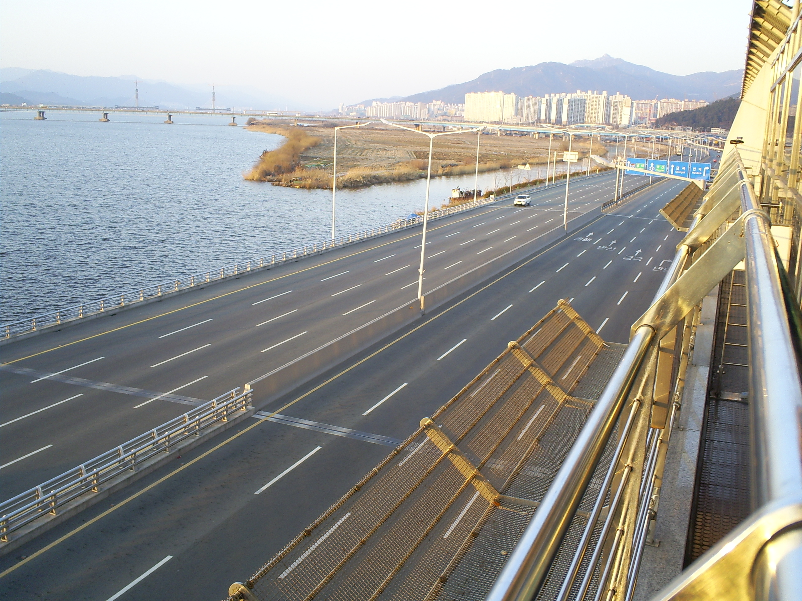 부산 도시철도 3호선 구포역 전망대에서 촬영한 강변대로의 모습